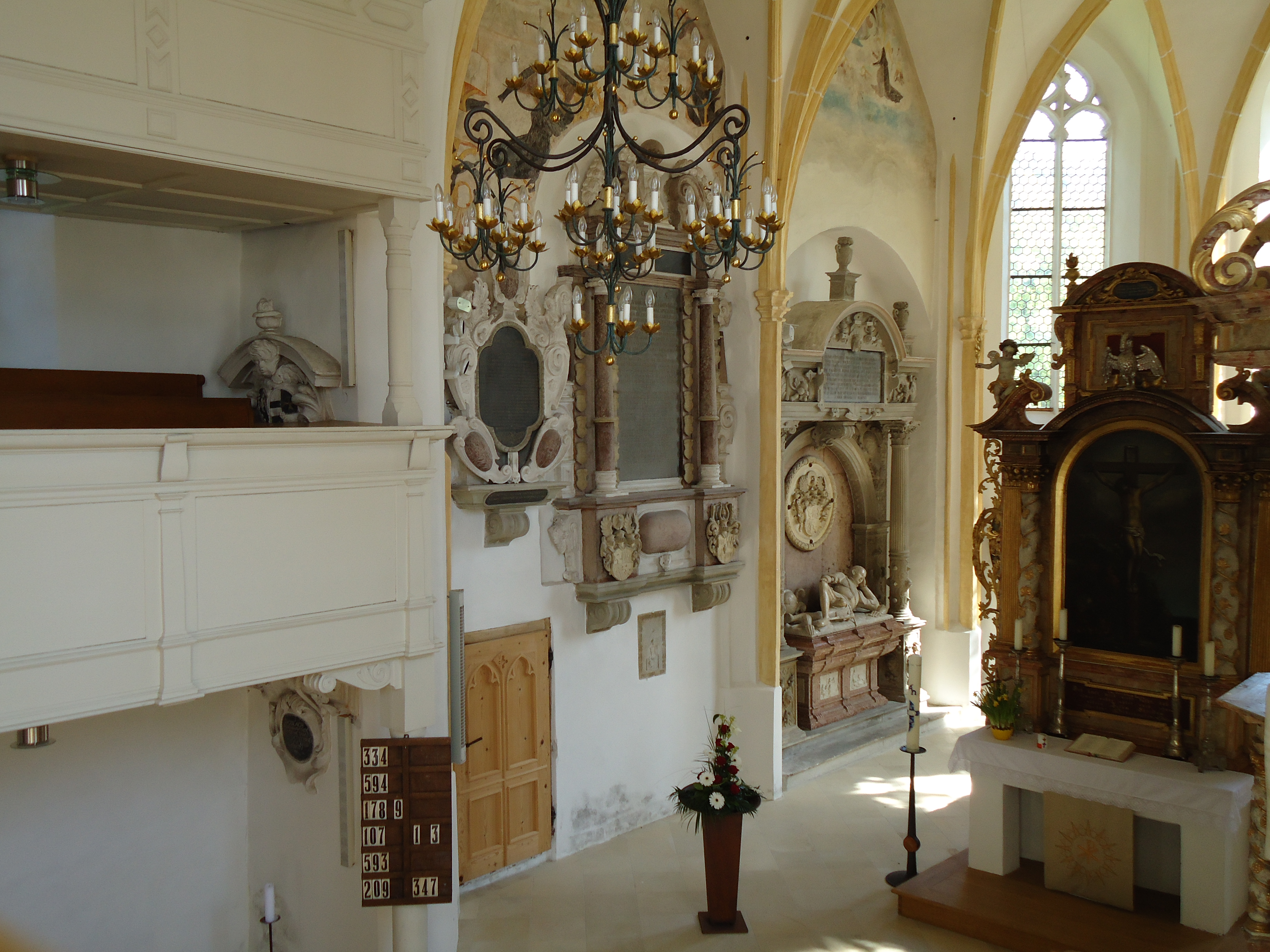 Blick in den Chorraum von der Empore aus